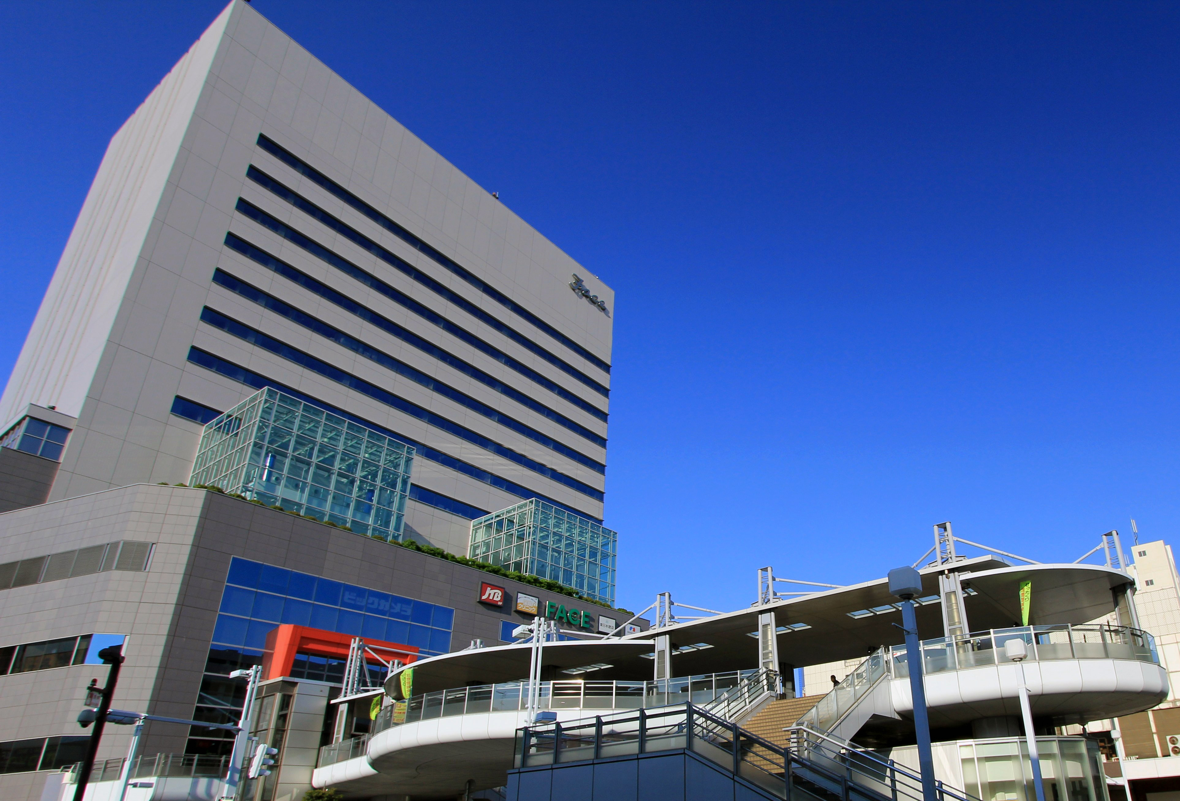 船橋駅南口フェイス船橋